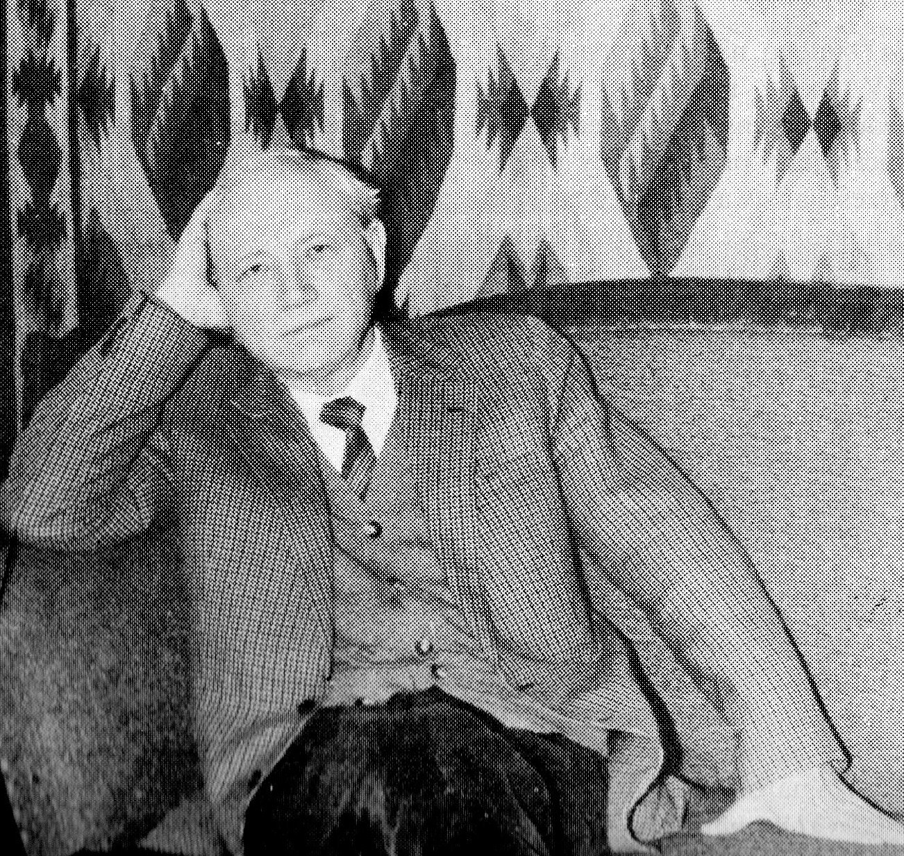 Jan Białostocki - polski historyk sztuki. 1988r.